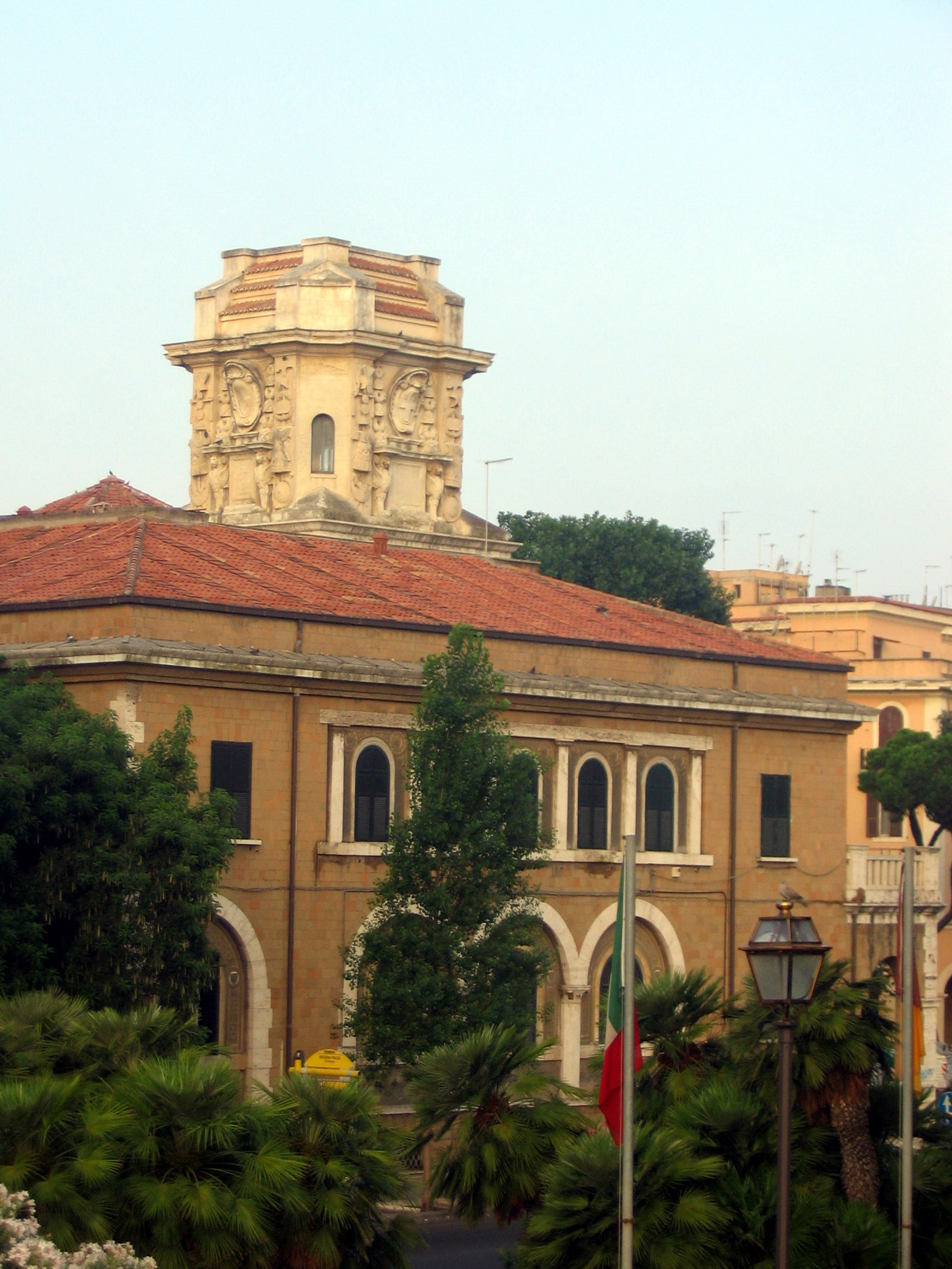 Ostia Lido, Roma, Italia